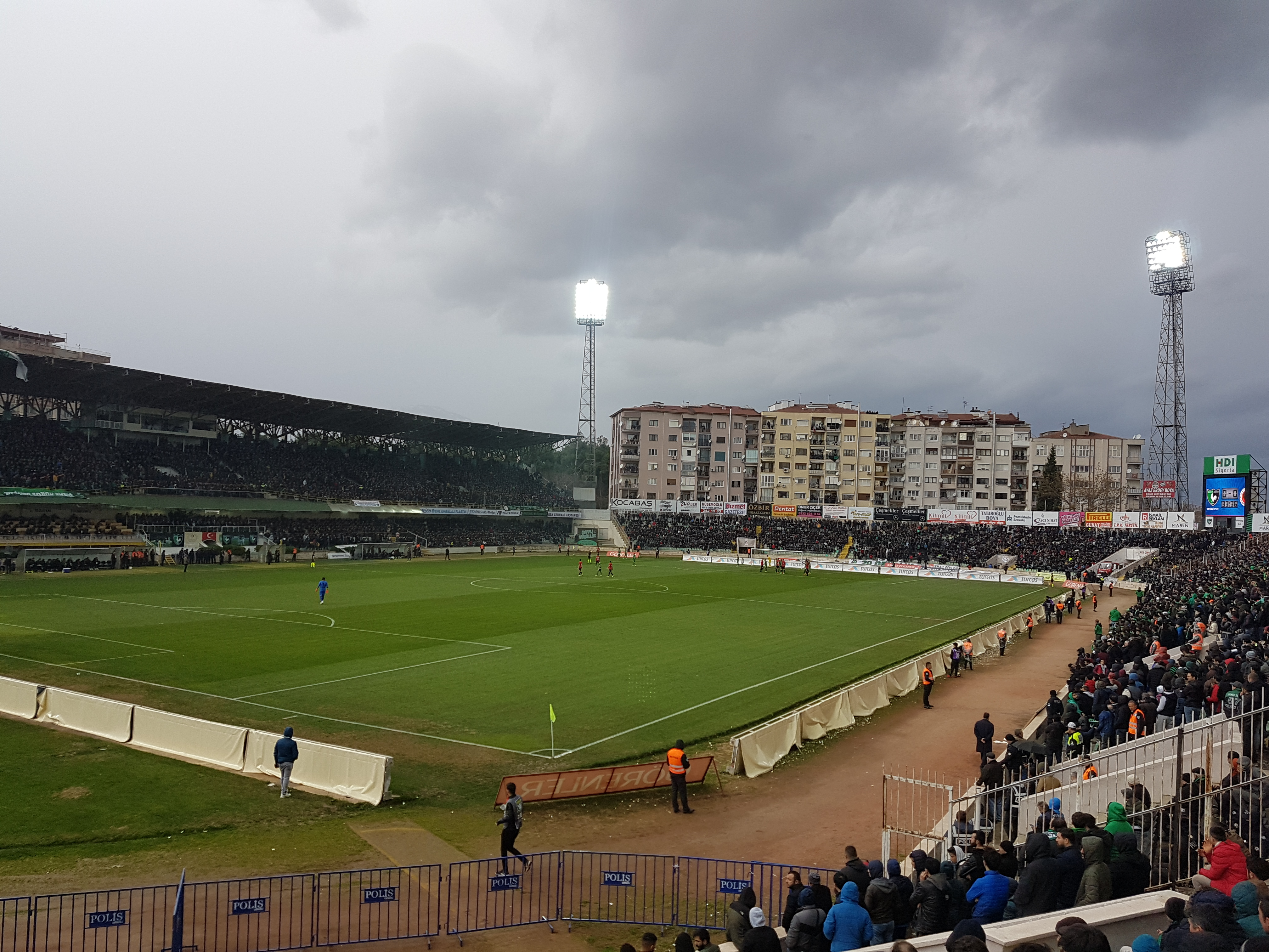 9 Aralık 2018 tarihinde oynanan Denizlispor-Gençlerbirliği karşılaşması